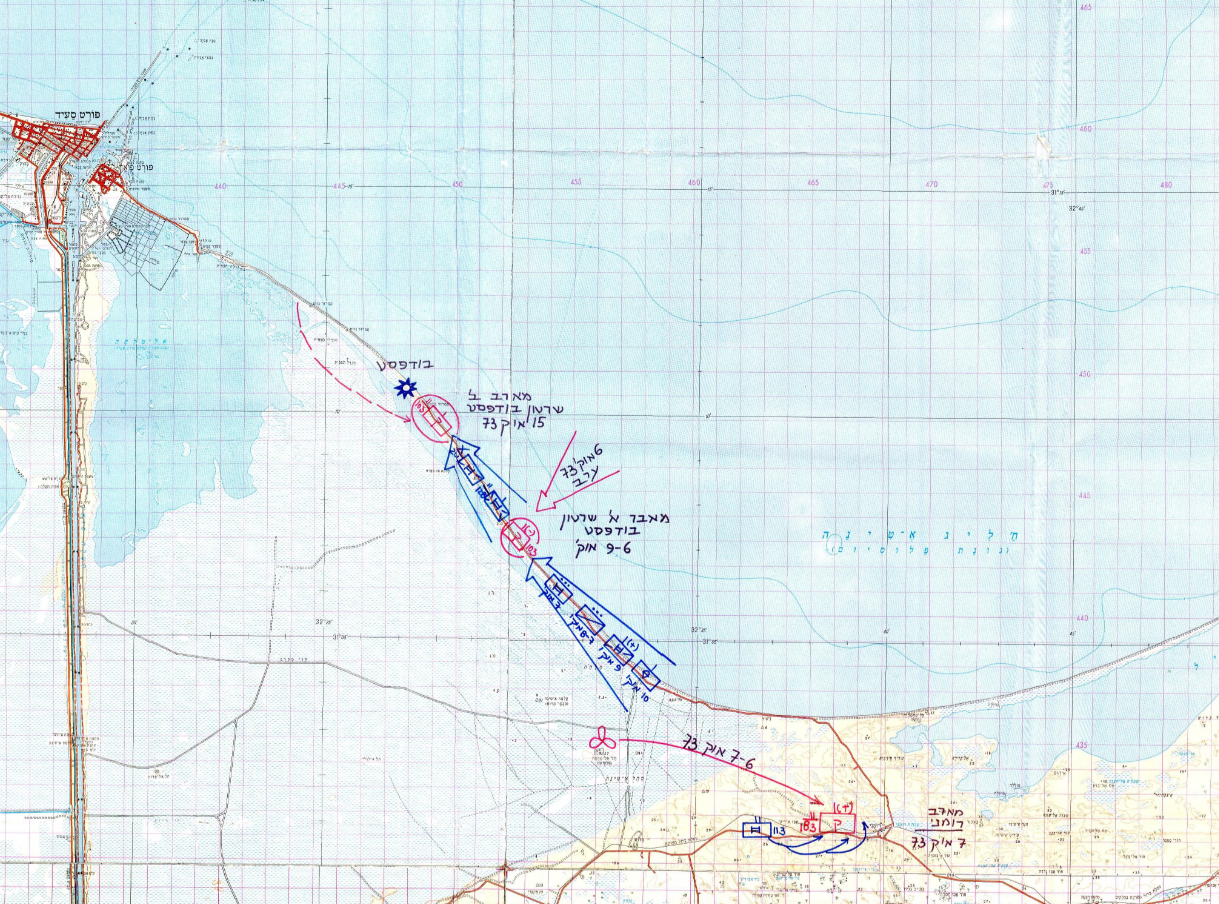 מתקפות הקומנדו המצרי בצפון סיני - מלחמת יום הכיפורים